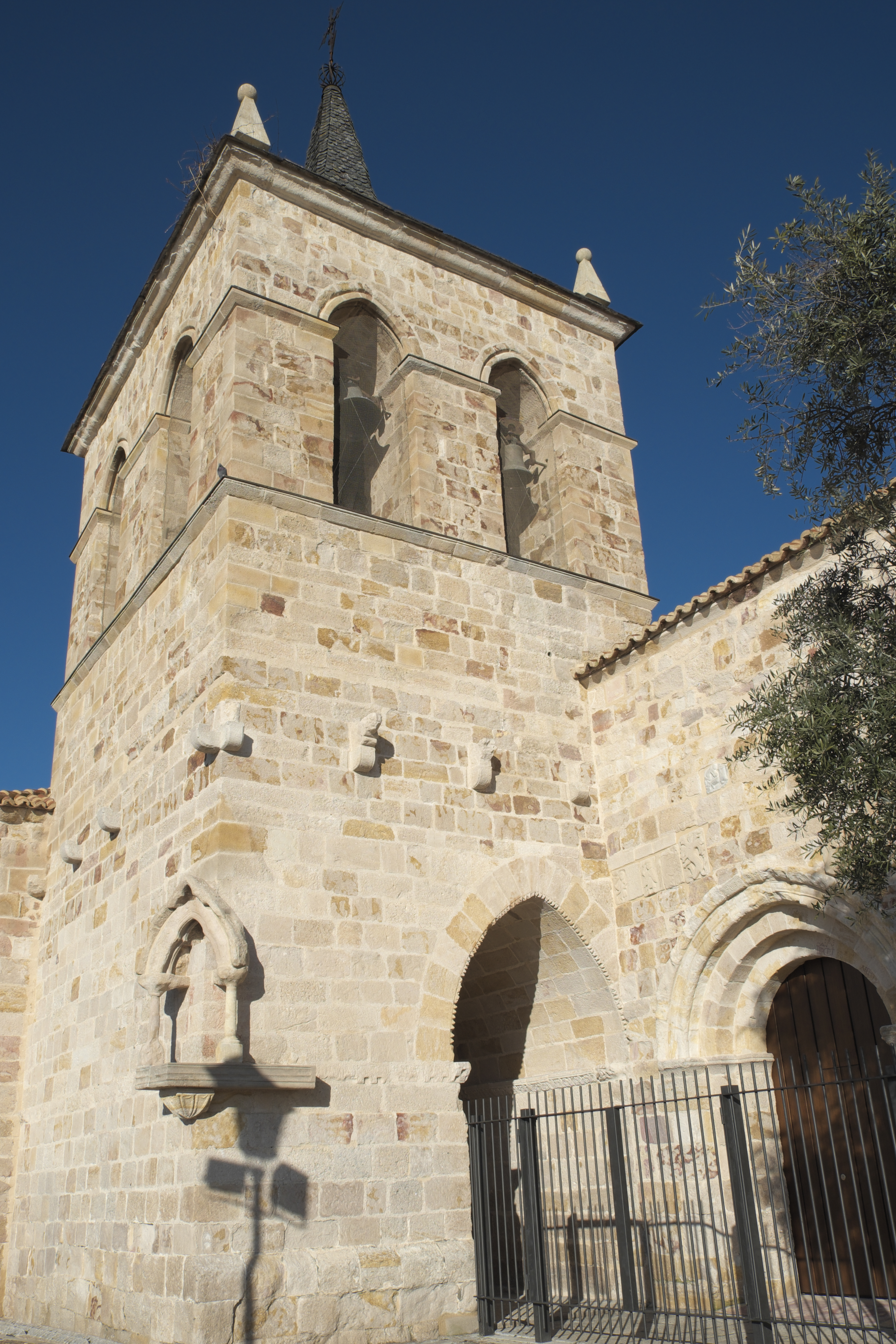 Kirche San Cipriano in Zamora (Kastilien-León/Spanien), Glockenturm aus dem 12./13. Jahrhundert